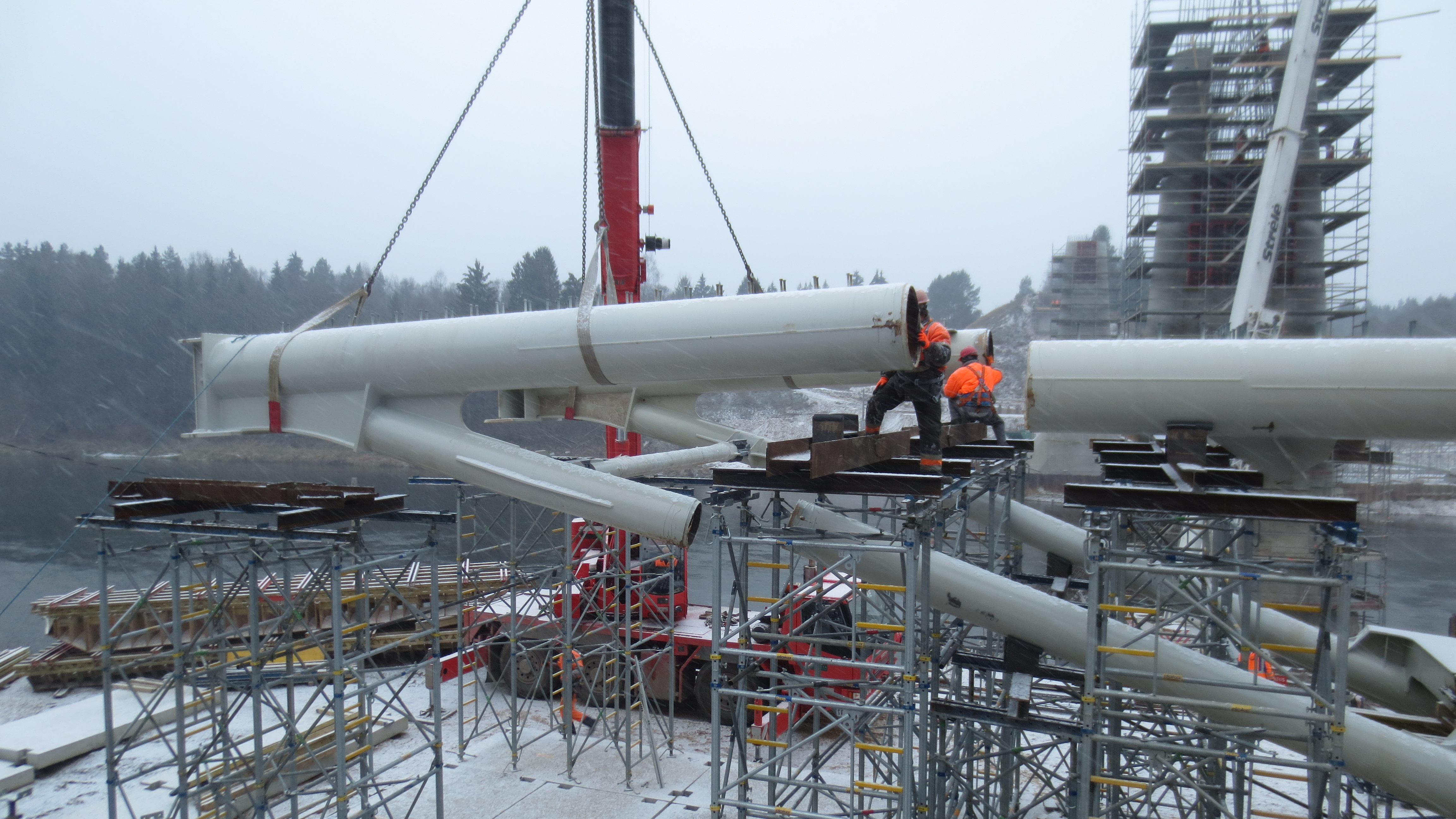 Perdangos konstrukcijų surinkimas